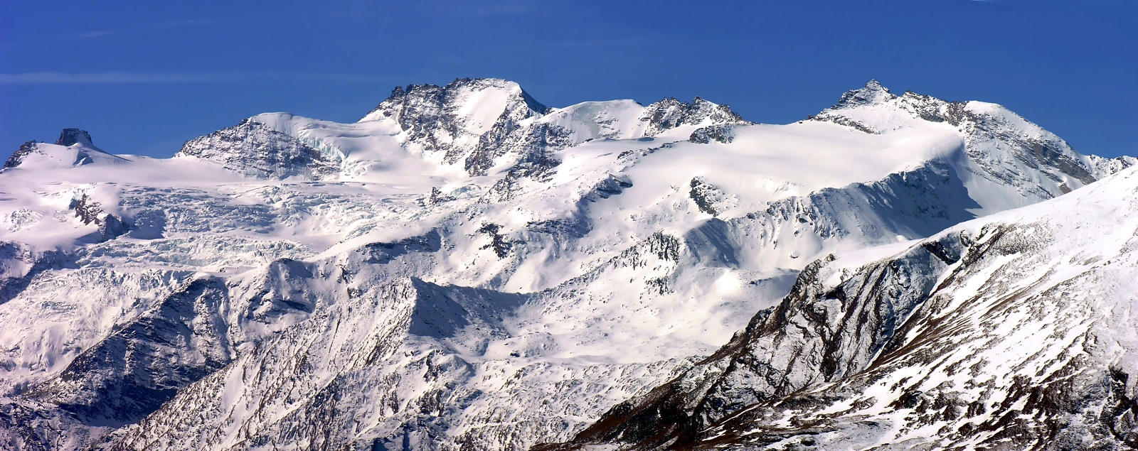 Il Massiccio del Gran Paradiso - Alpi Graie - Italy